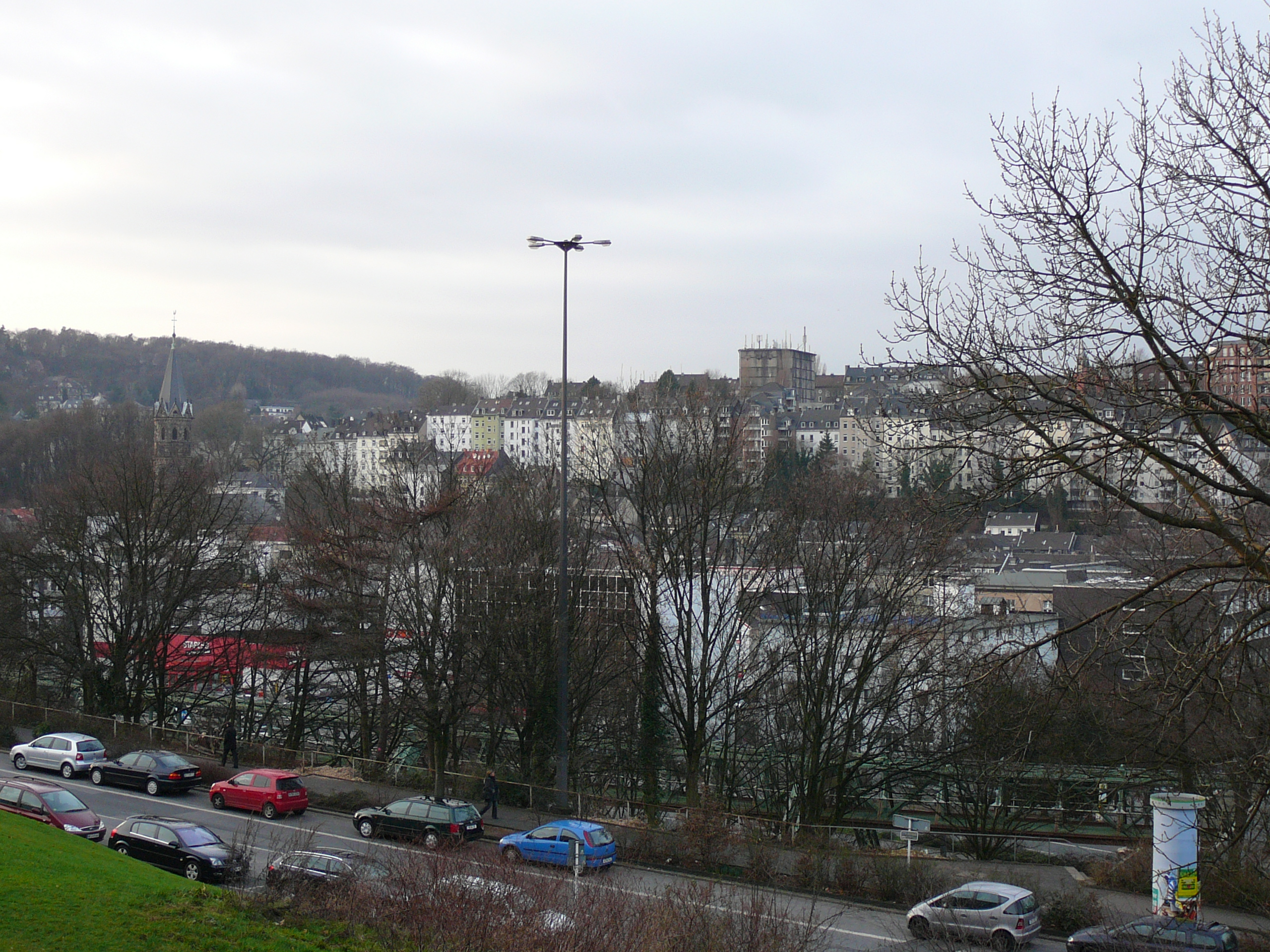 Johannisberg, Wuppertal